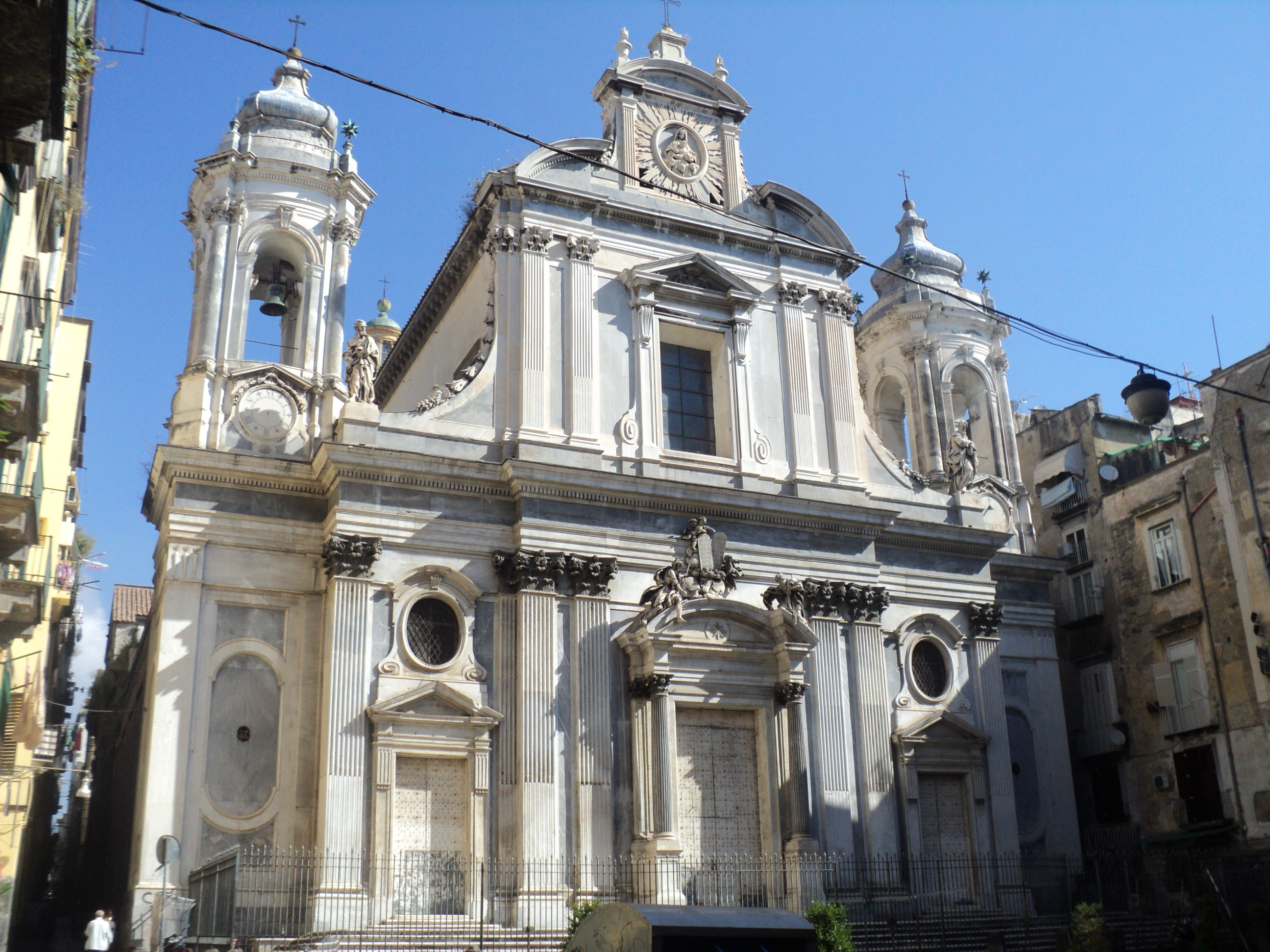 Chiesa dei Girolamini (Napoli)